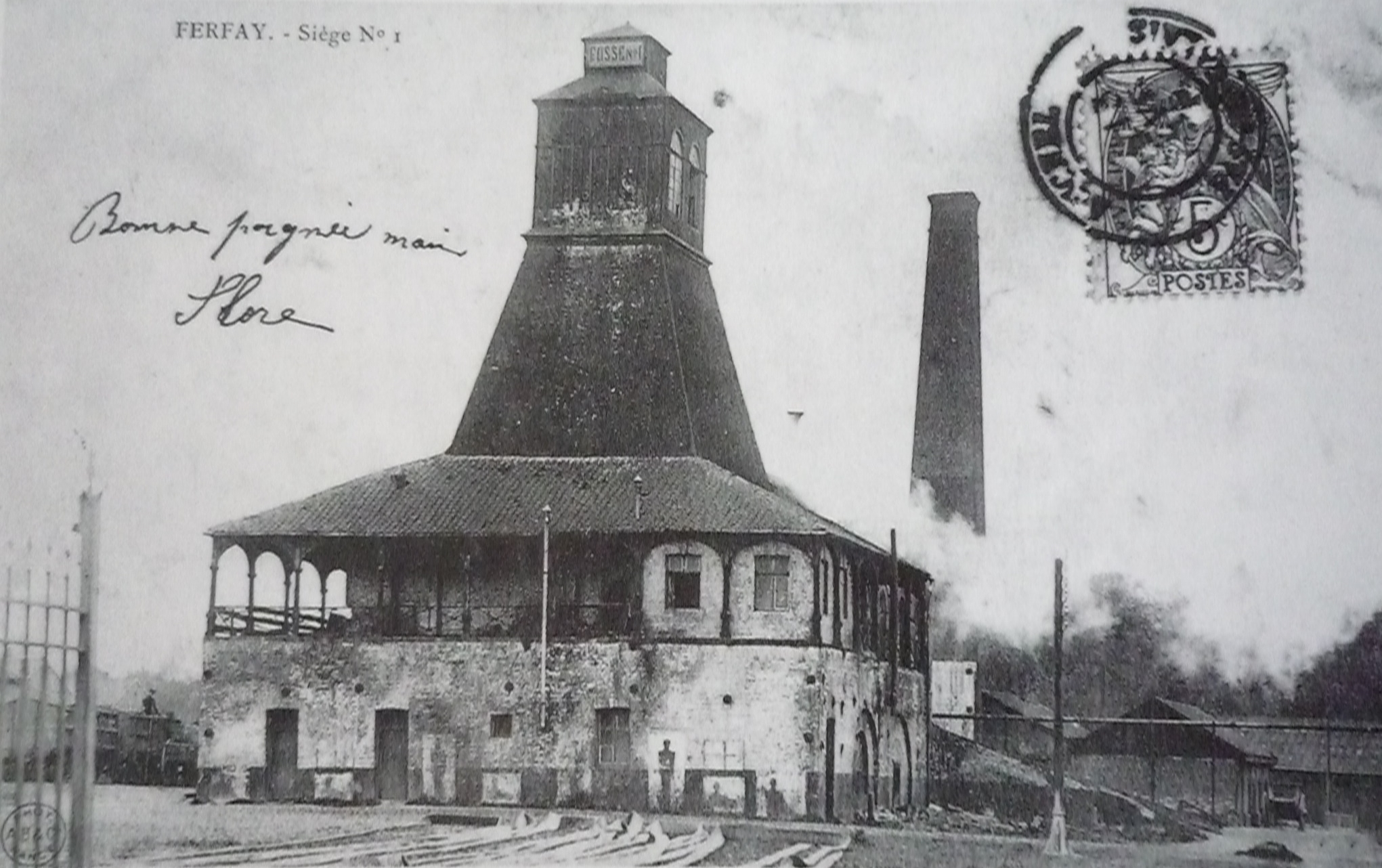 La Fosse n° 1 de la Compagnie des mines de Ferfay, devenue la Fosse n° 4 ter de la Compagnie des mines de Marles, était un charbonnage constitué d'un seul puits situé à Auchel, Pas-de-Calais, Nord-Pas-de-Calais, France.